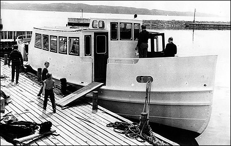 Tor i Visingsö hamn vid ombyggnaden från bogserbåt till passagerarfartyg.